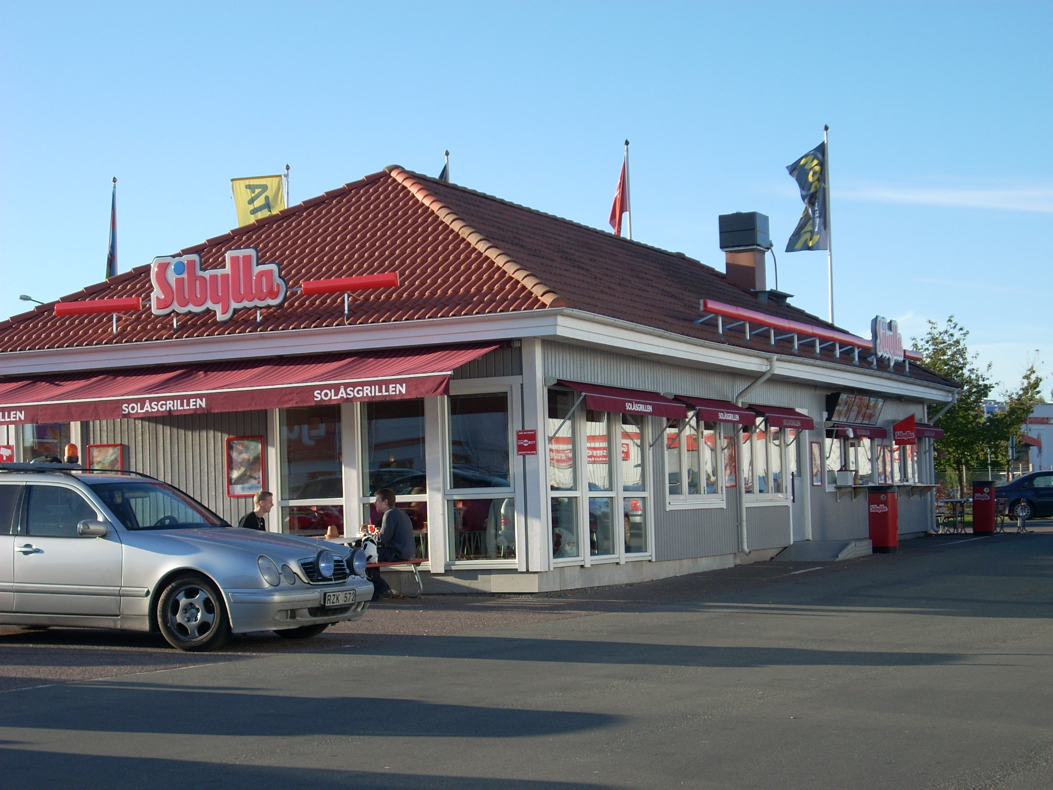 Sibylla på Solåsen i Jönköping